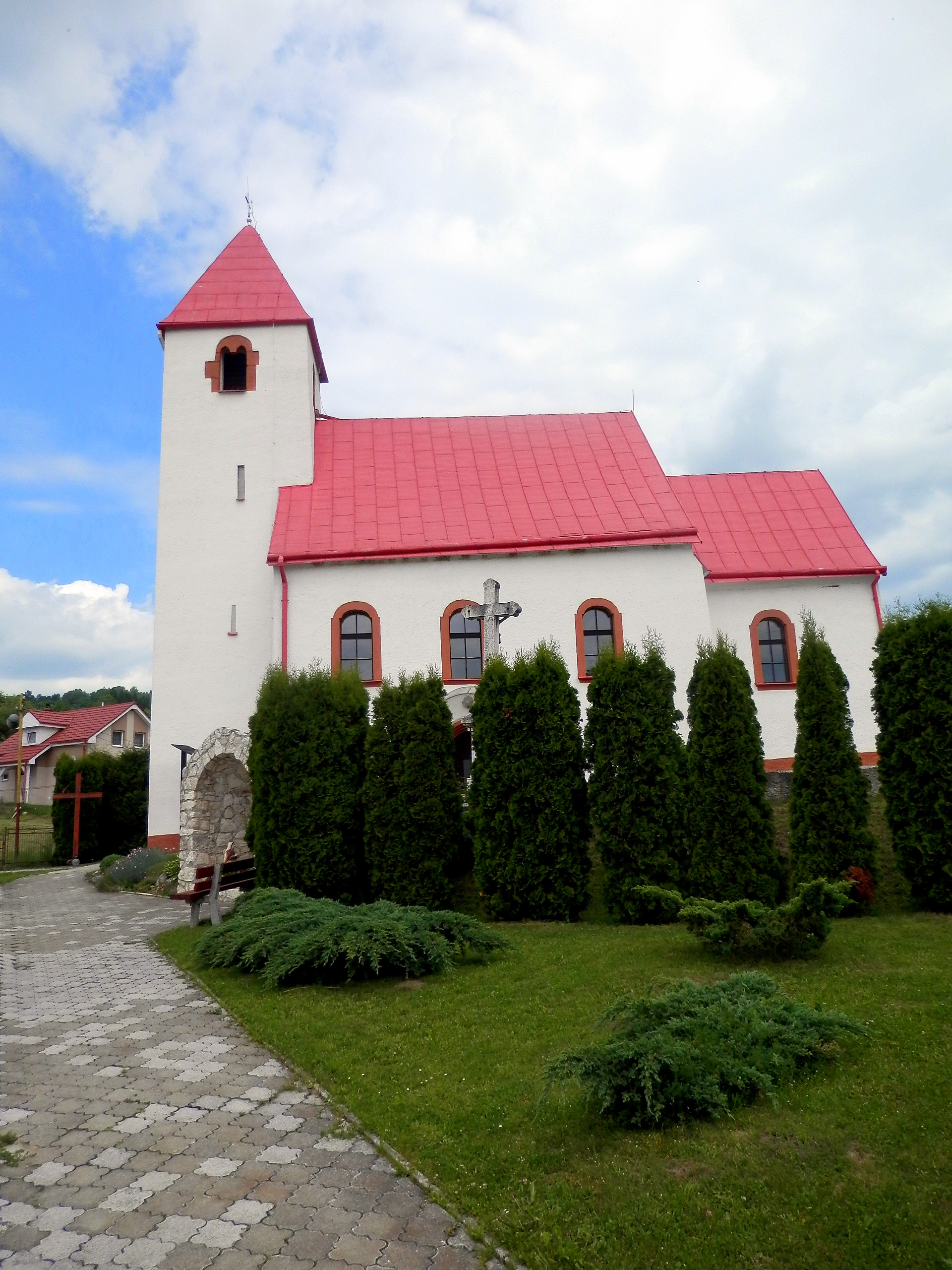 Národná kultúrna pamiatka, rímsko-katolícky kostol svätého Stanislava, lokalita svetového kultúrneho dedičstva, doba vzniku kon.13.storočia, prevládajúci sloh gotika, Obec Pongrácovce, okres Levoča.